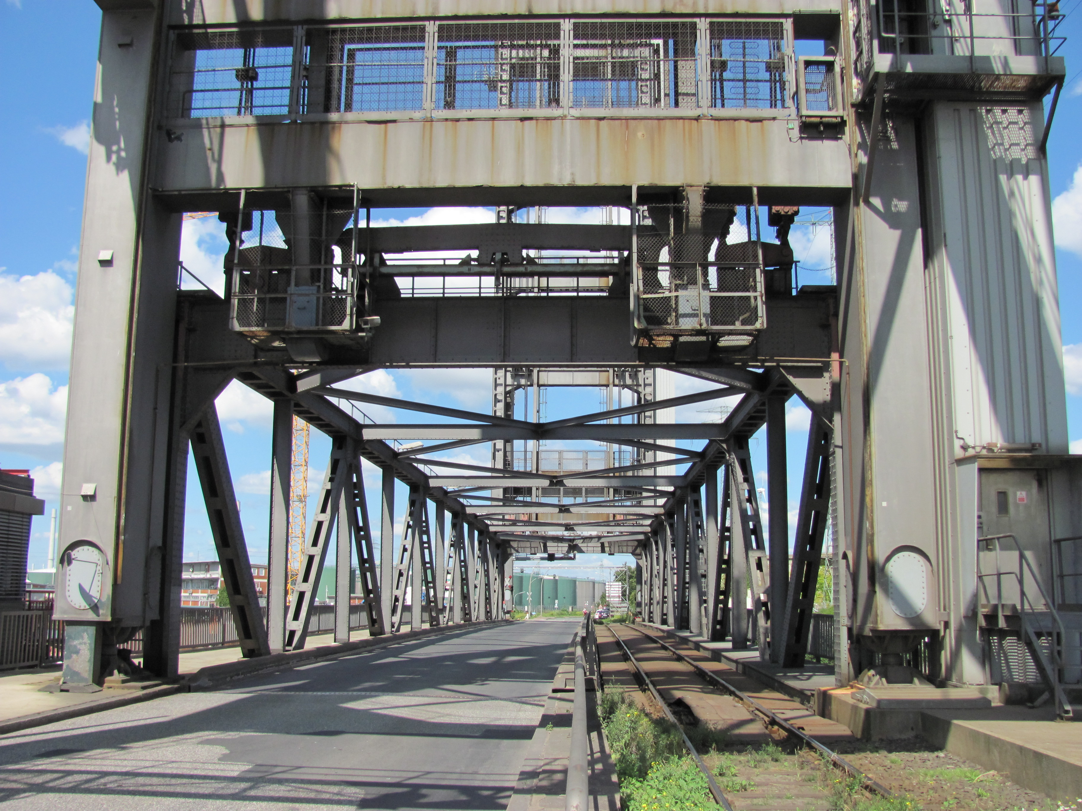 Rethe-Hubbrücke in Hamburg-Wilhelmsburg